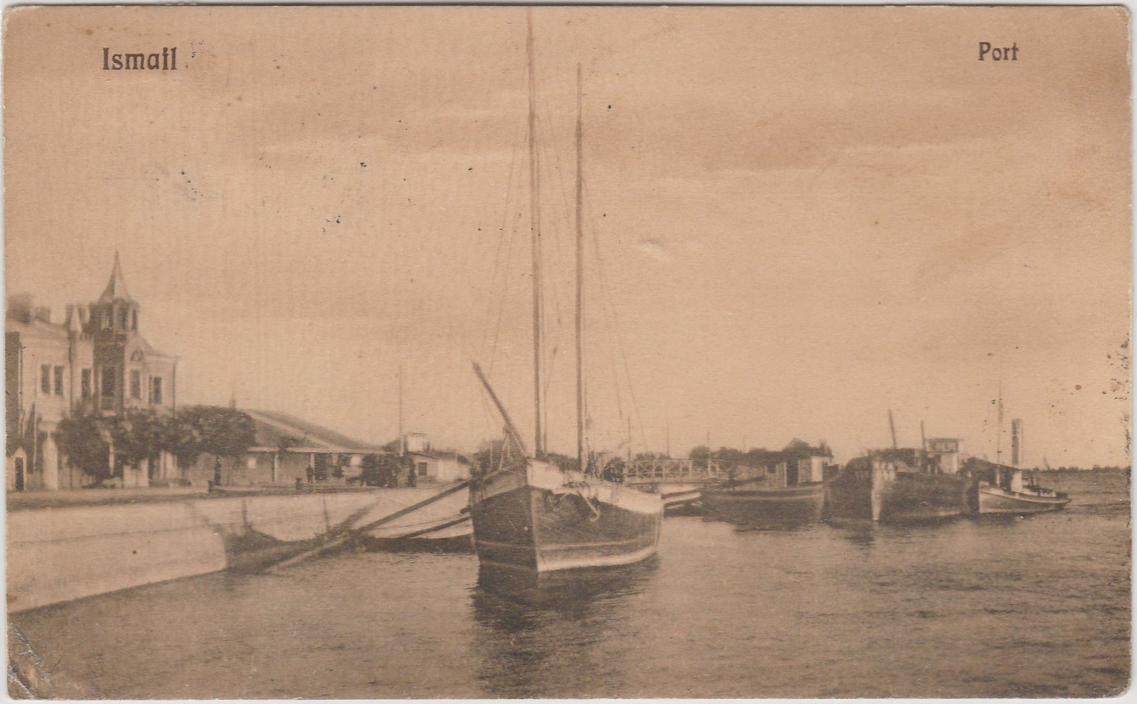 Измаильский порт